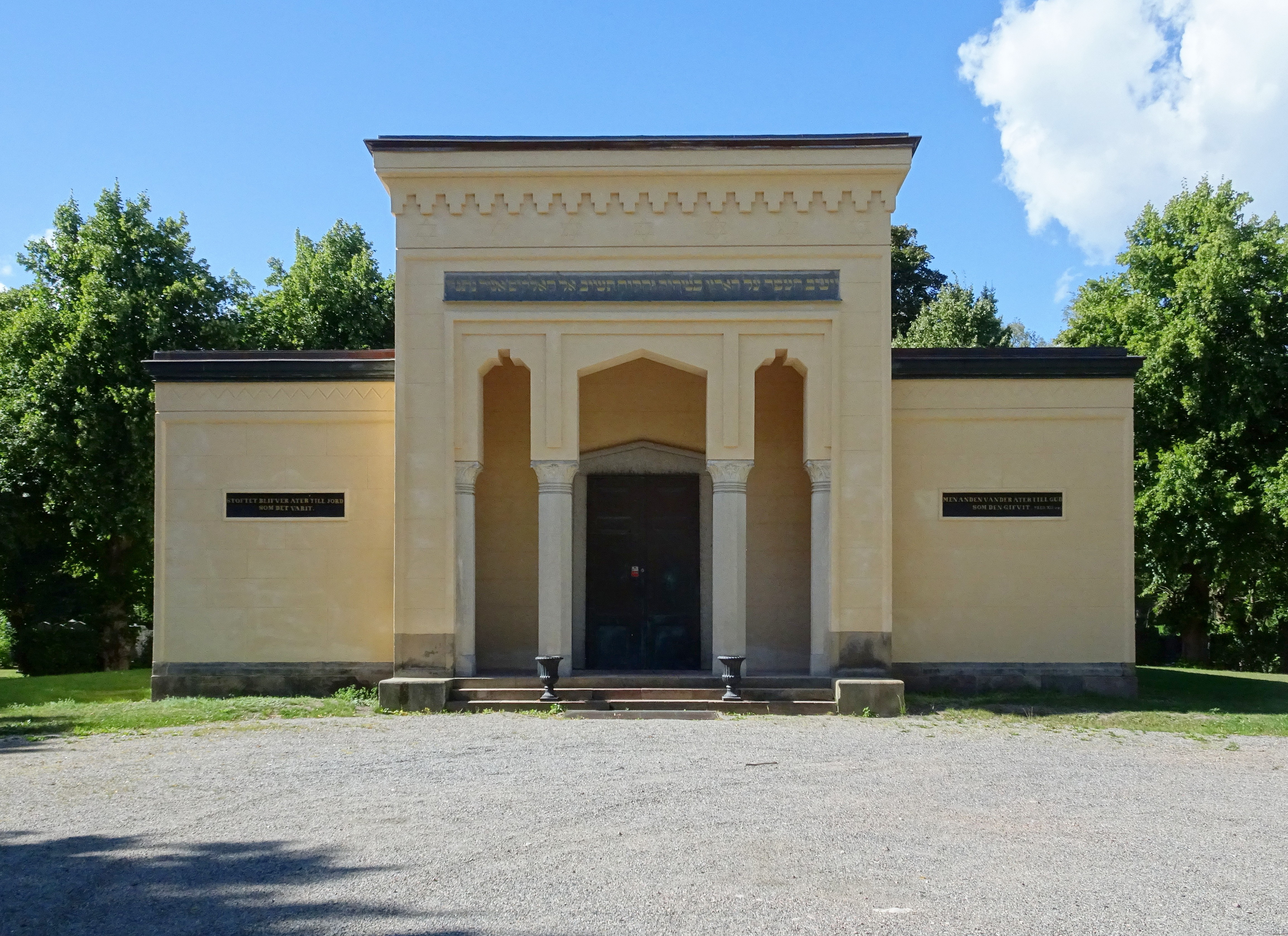 Mosaiska gravkapellet, Norra begravningsplatsen